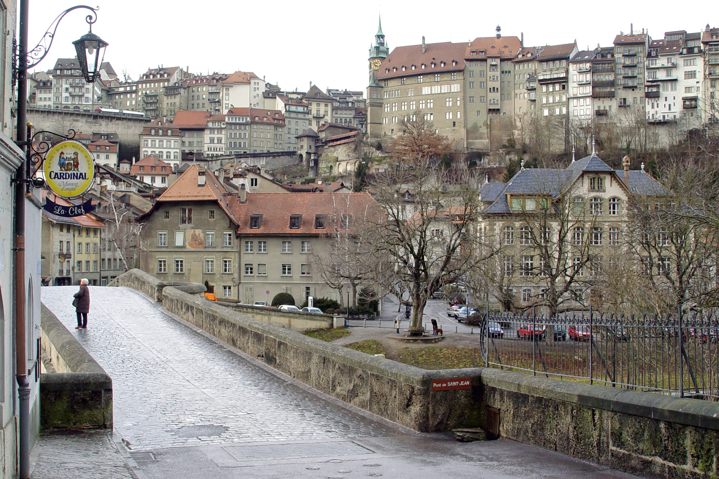 Saint-Jean-Bréck zu Fribourg.